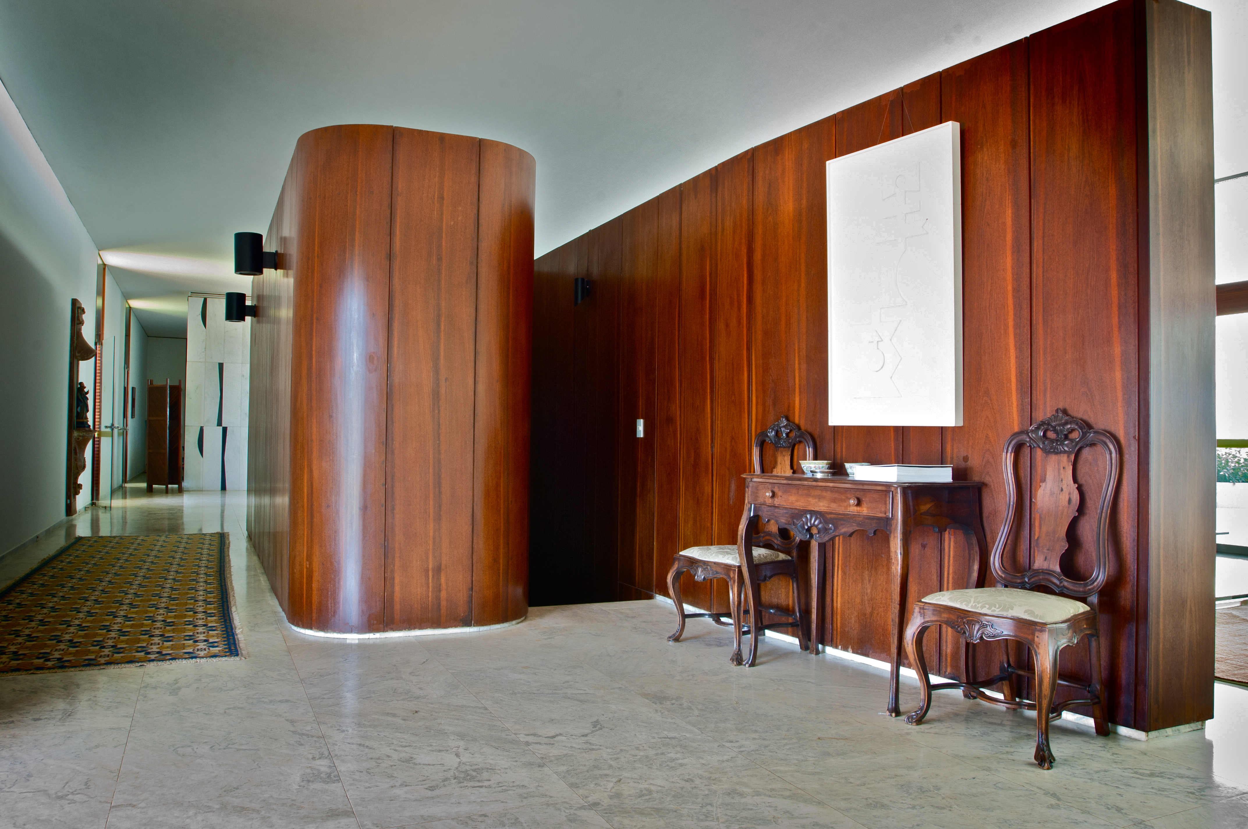 Palácio do Jaburu - Hall de Entrada Foto: Aluizio Assis